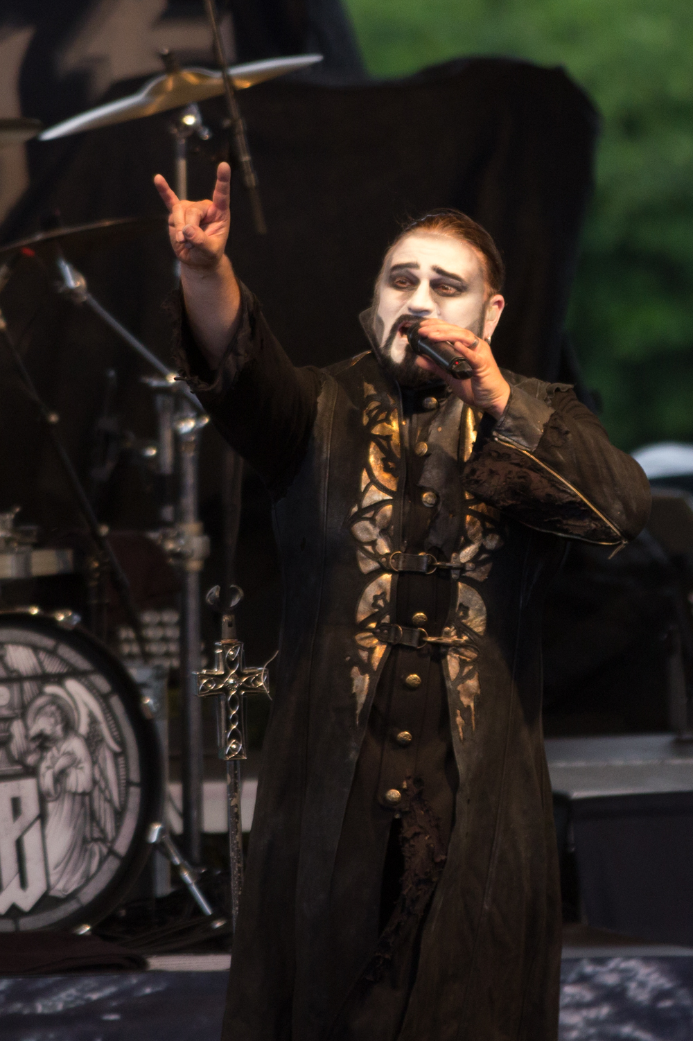 Sabaton Open Air Powerwolf Sänger